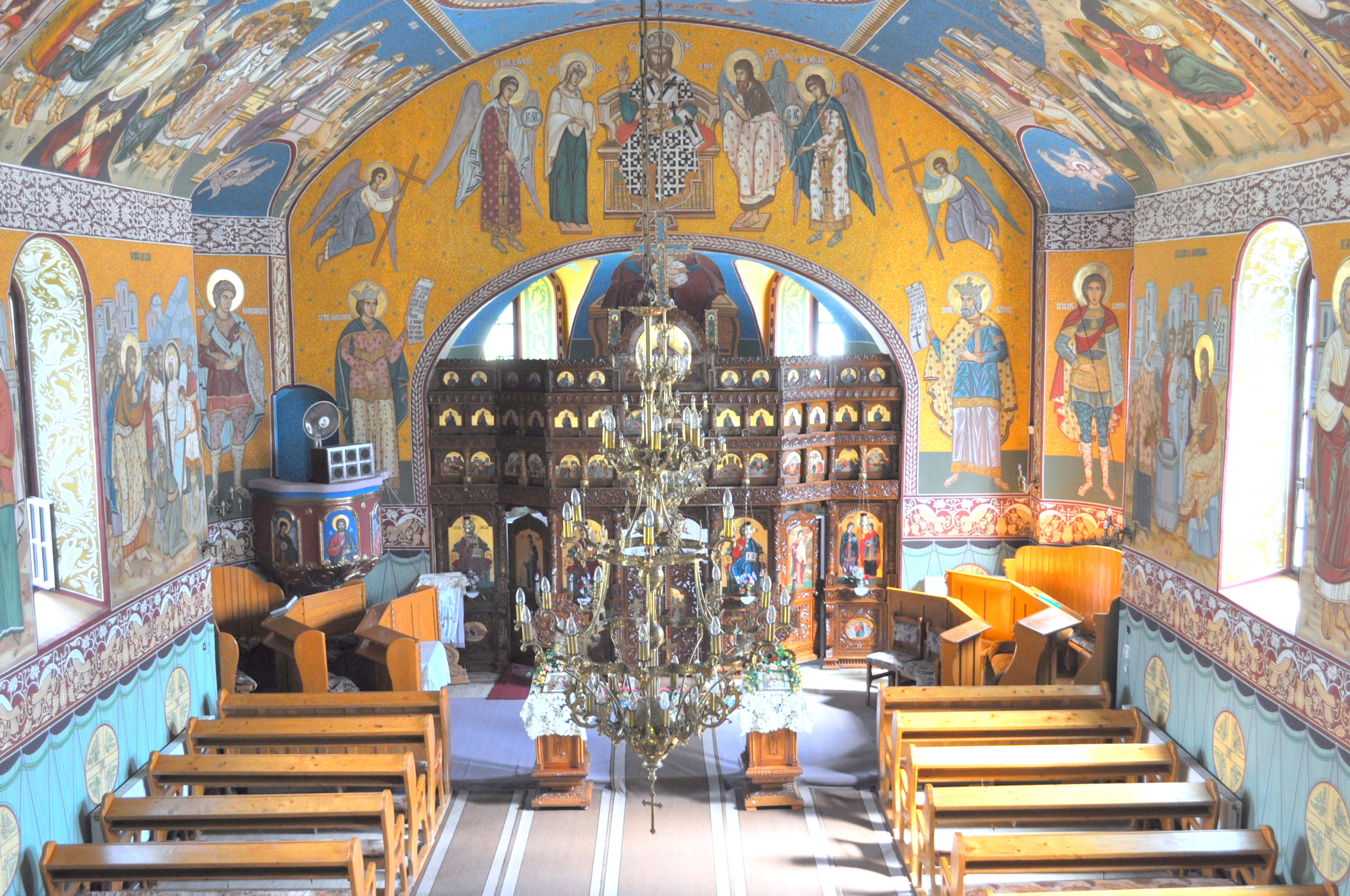 Biserica ortodoxă „Sf. Arhangheli Mihail și Gavriil”, sat Feldru; comuna Feldru